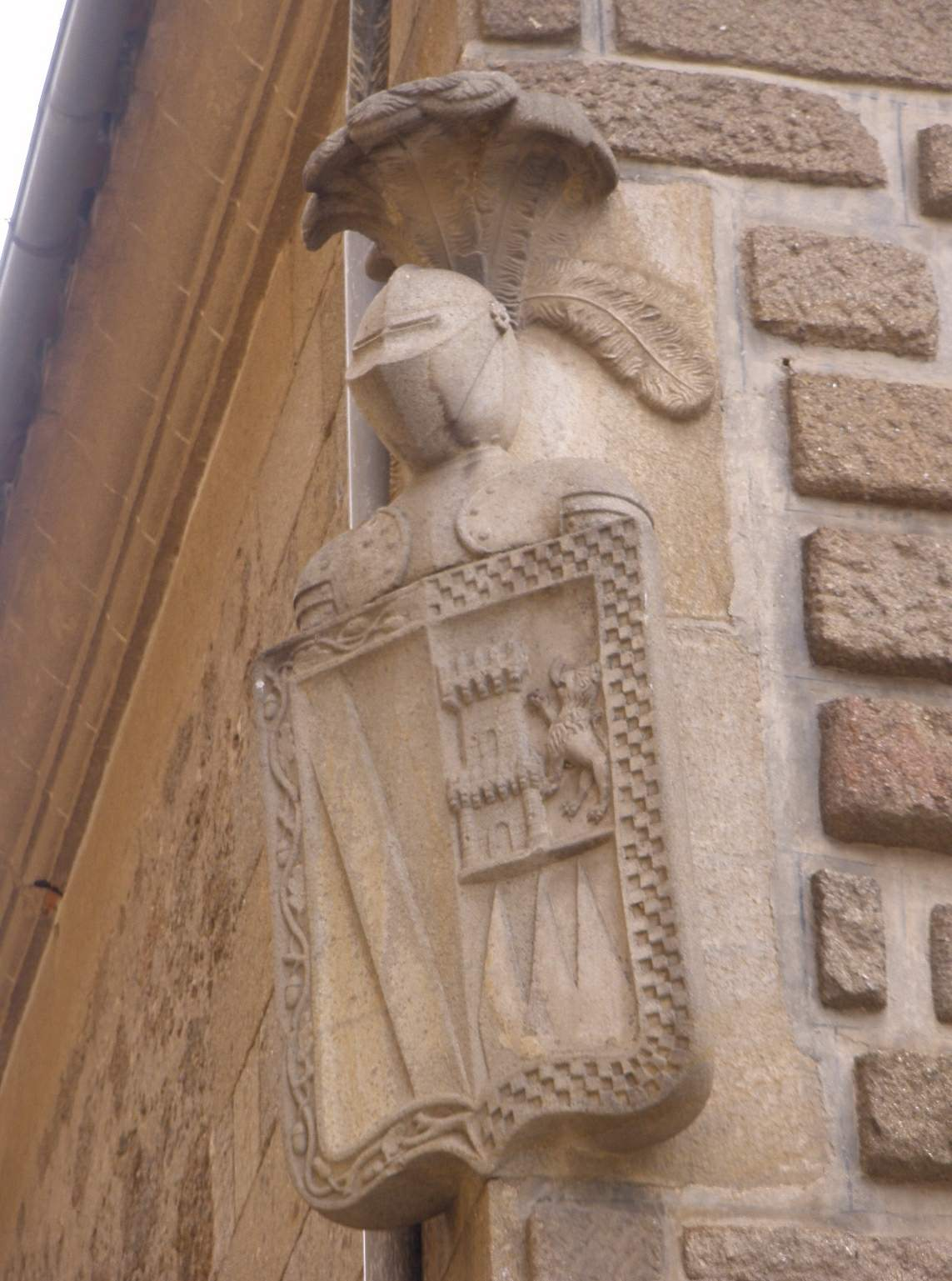 Plasencia - Hotel Palacio Carvajal Girón